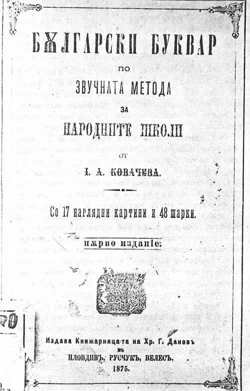 Корица на „Български буквар“ на Йосиф Ковачев.